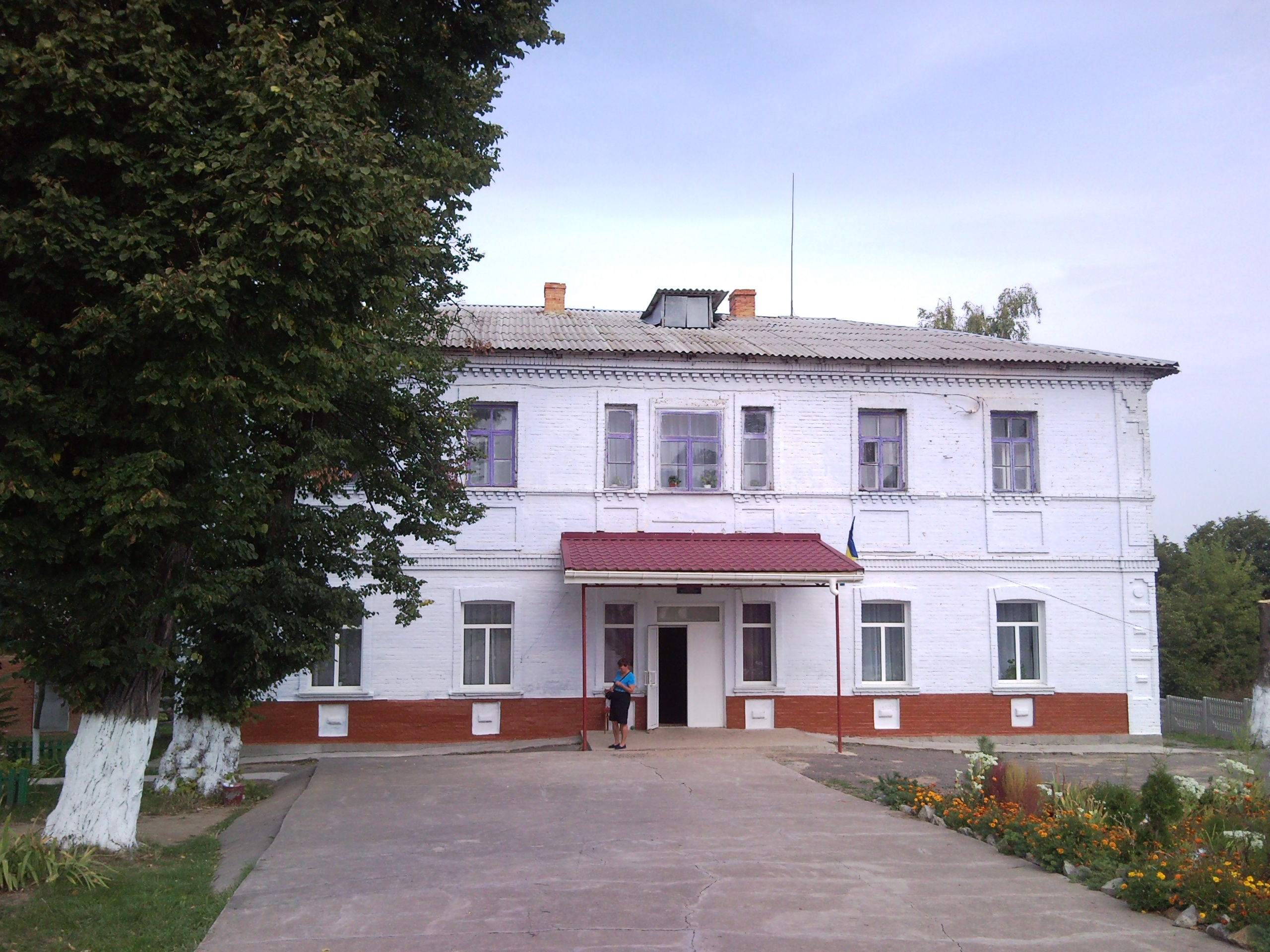 Шершні. Школа